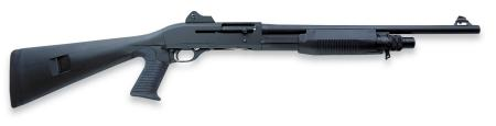 Benelli M3 Super 90 combat shotgun